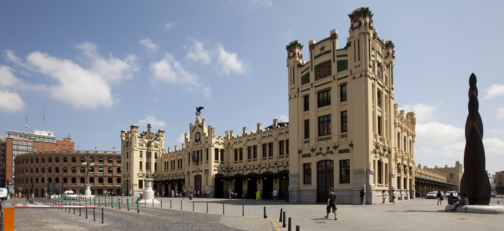 Cultural Heritage Spain